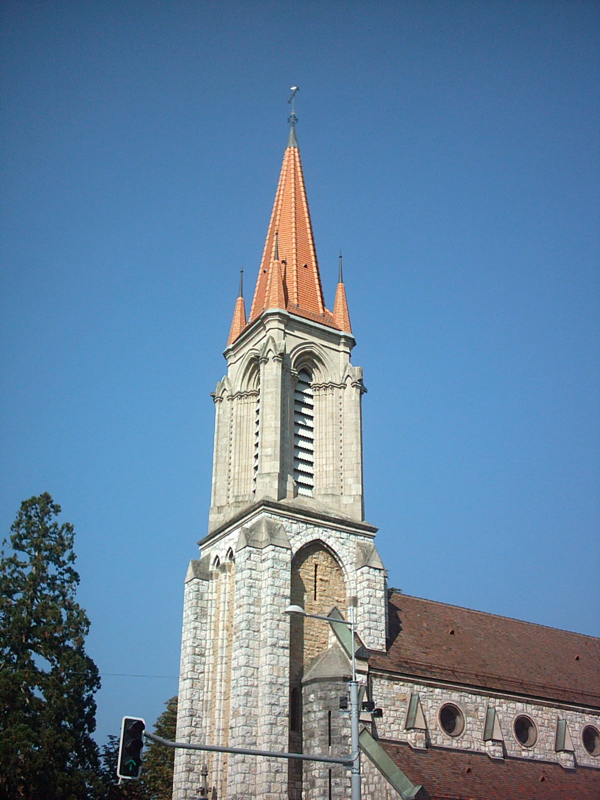 Église Notre-Dame-des-Grâces à Lancy (Suisse)